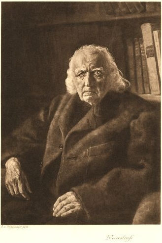 Karl Weierstraß, Heliogravüre nach Gemälde von R. v. Voigtländer